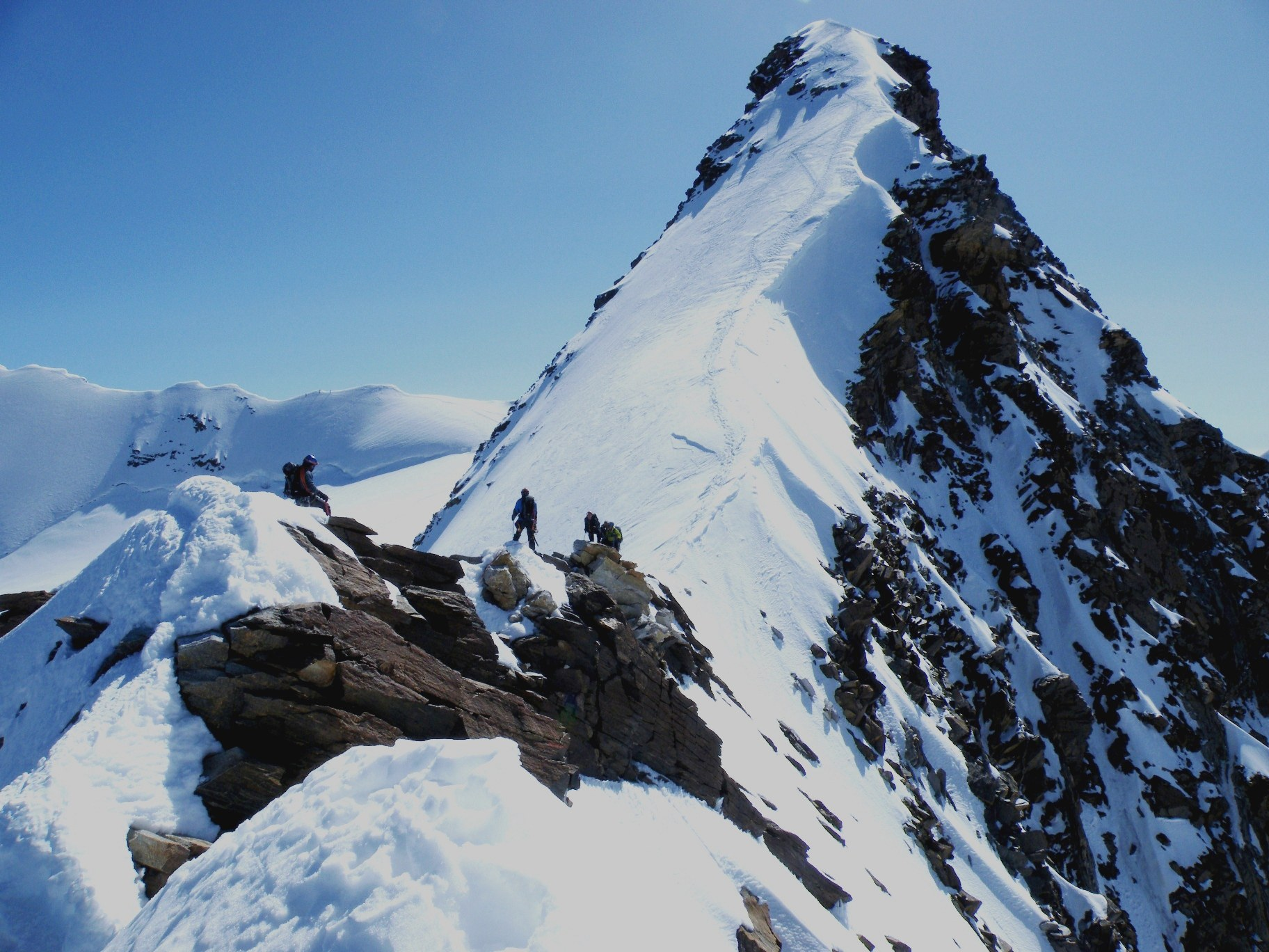 Oberen Westgrat Gipfel huippu Dufourspitzen länsiharjanteella